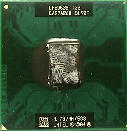 Core世代CeleronM